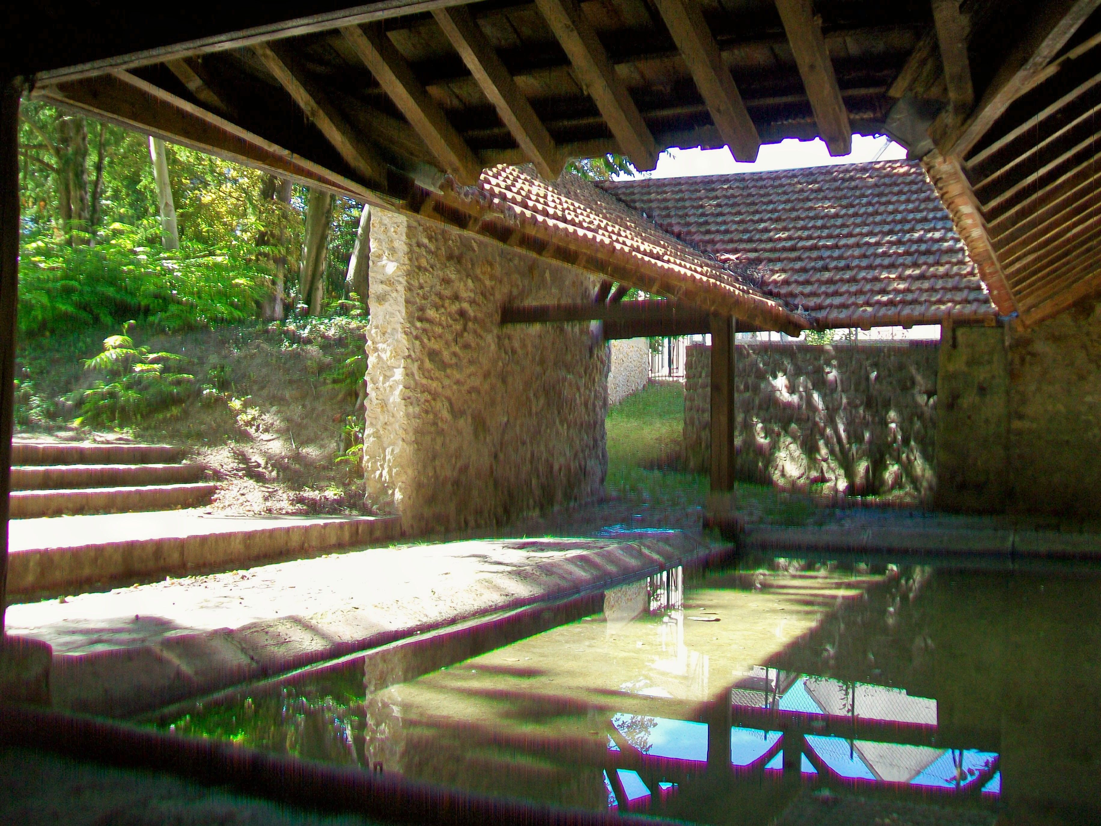 Intérieur du lavoir au 21ter Grande-rue.